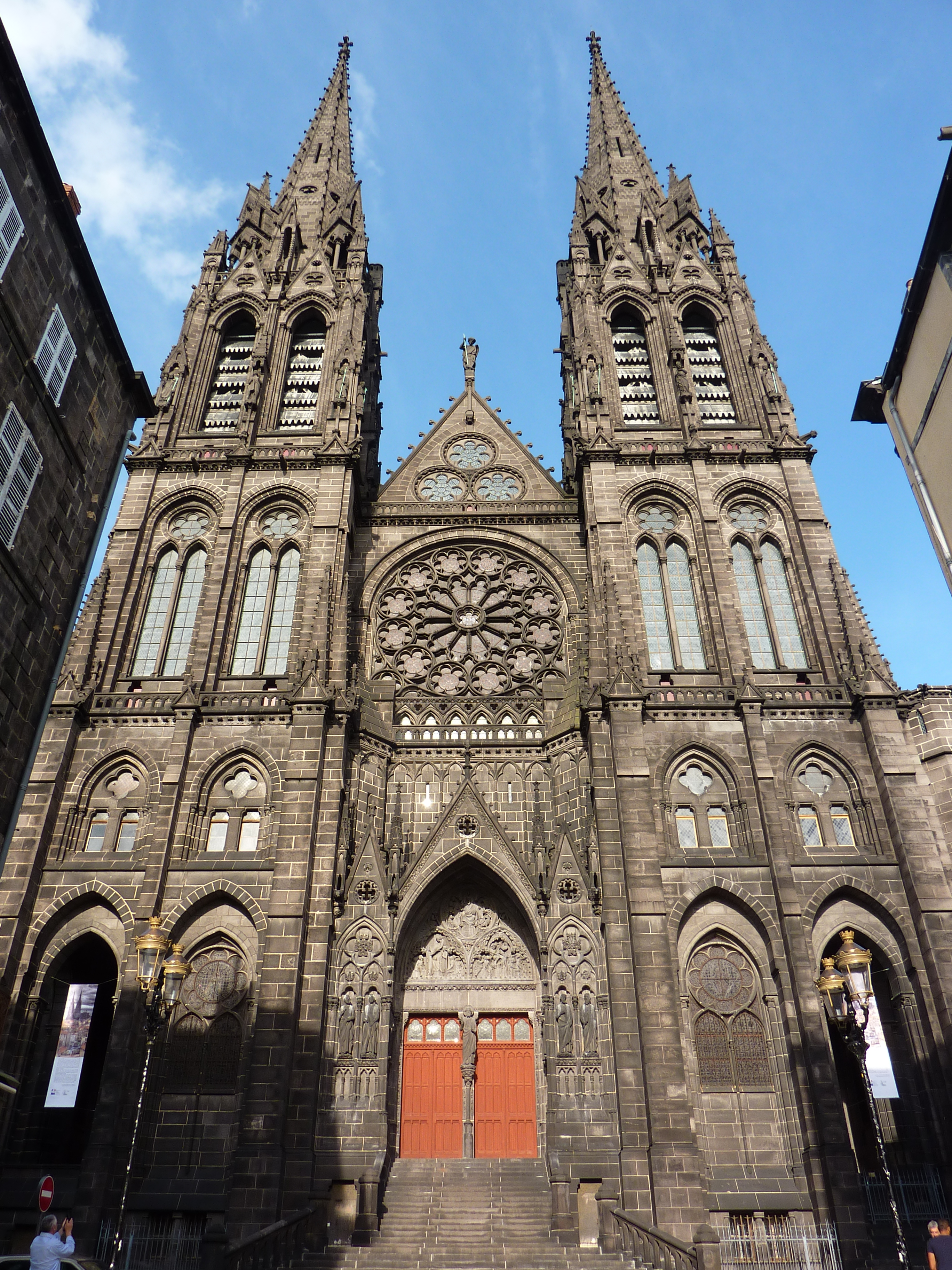 Cathédrale Notre-Dame-de-l'Assomption de Clermont